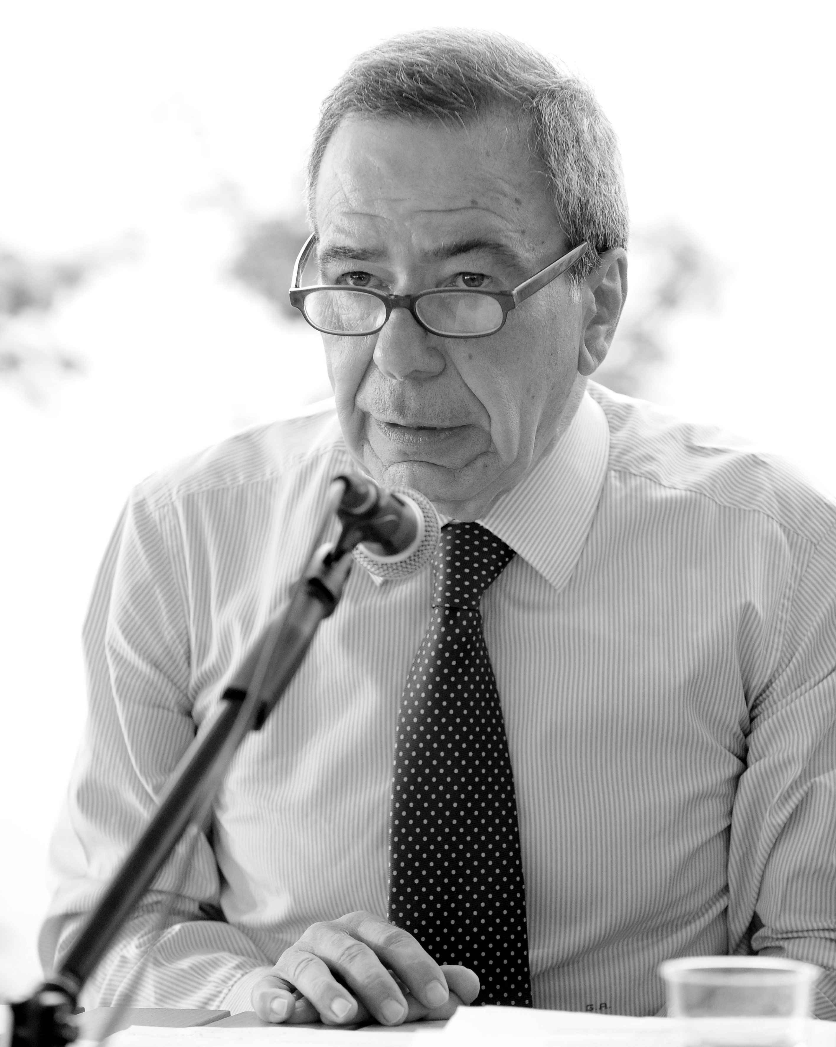 Giulio Anselmi a Mantova per il Festivaletteratura 2012.